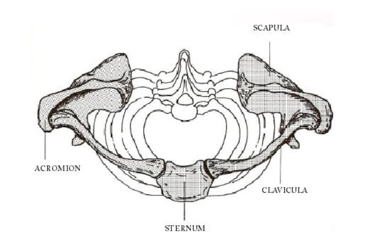 Hartiarengas